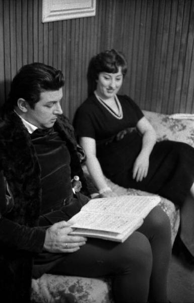 Milano: Teatro alla Scala - Spettacolo Anna Bolena, 1957, regia di Luchino Visconti - Camerino, interno - Gianni Raimondi e Gabriella Carturan